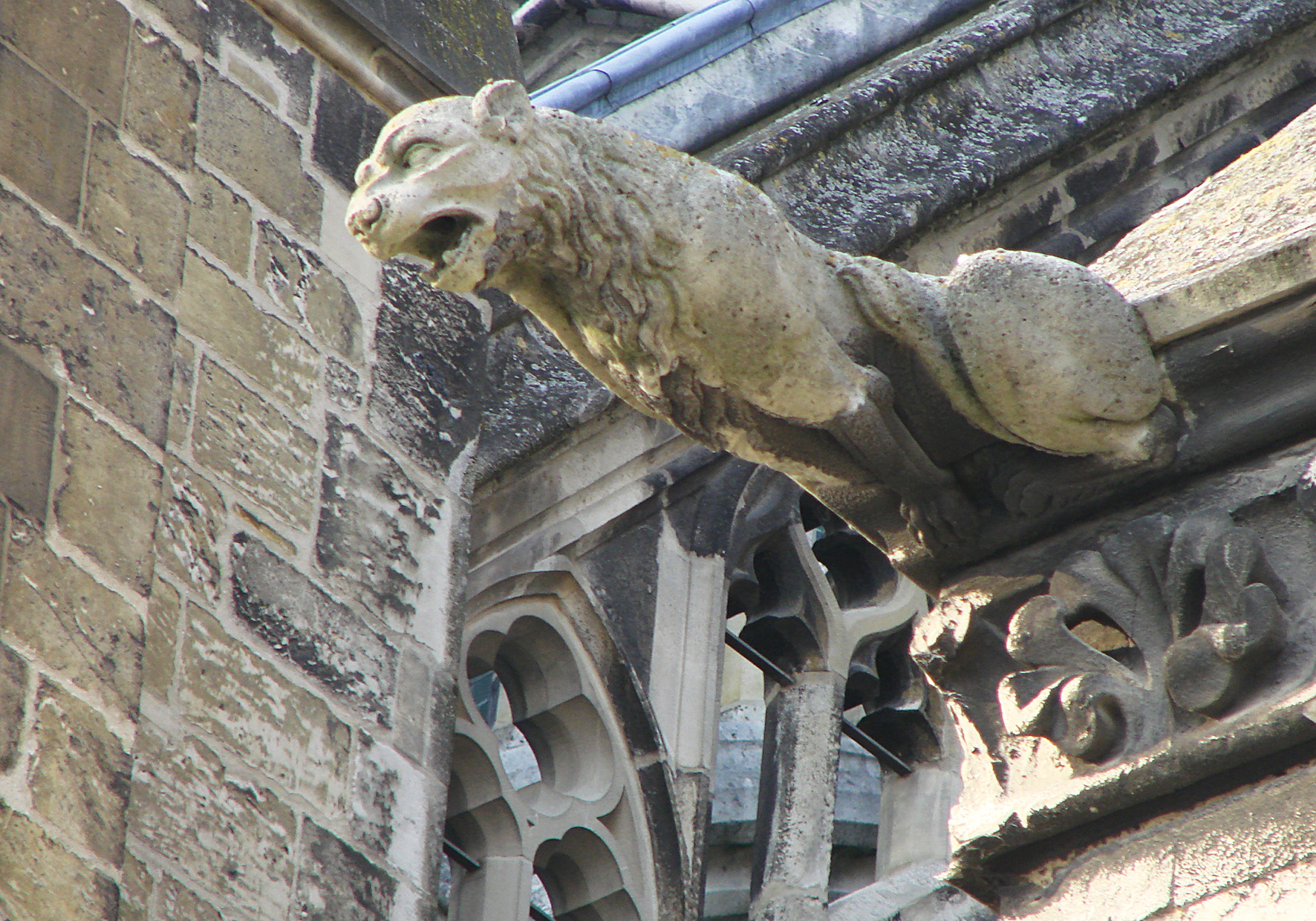 Gargouille,cathédrale d'Amiens.